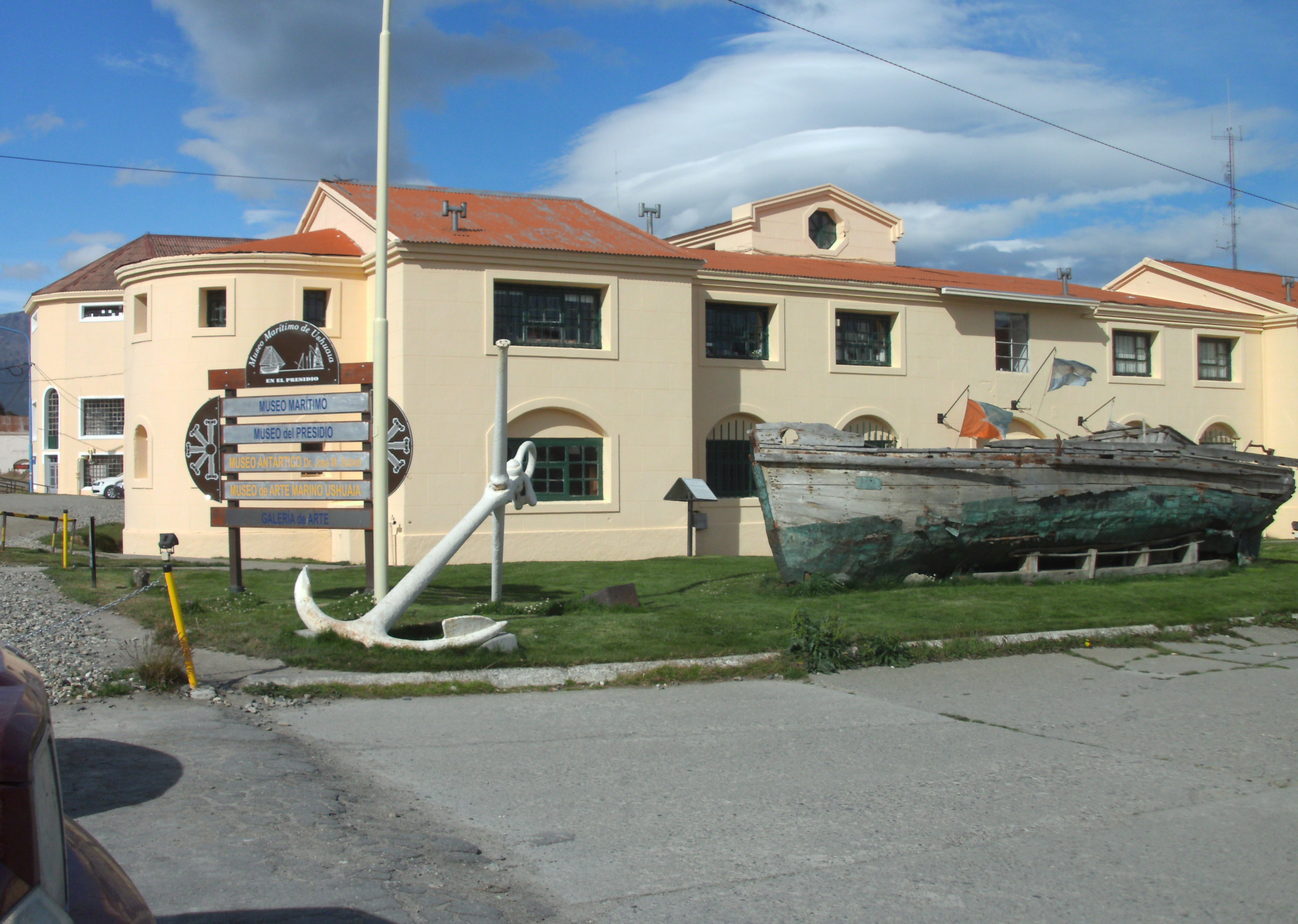 El penal de Ushuaia fue una cárcel que funcionó en la ciudad argentina de Ushuaia entre 1904 y 1947. Se ubica frente a la esquina de las actuales calles Yaganes y Gobernador Paz de la ciudad de Ushuaia